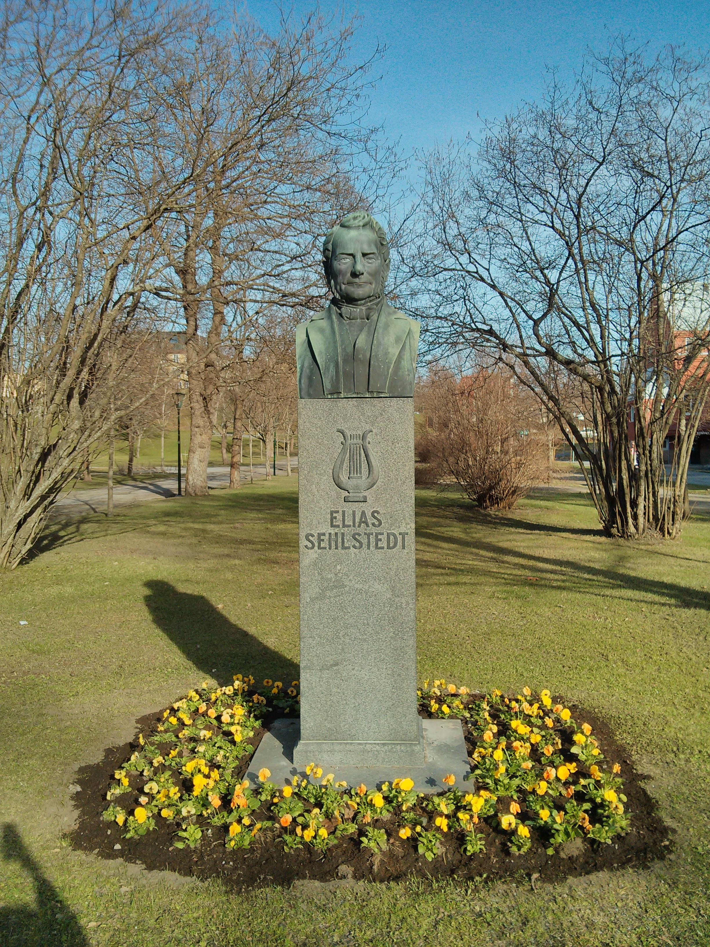 Byst i Stadsparken i Härnösand